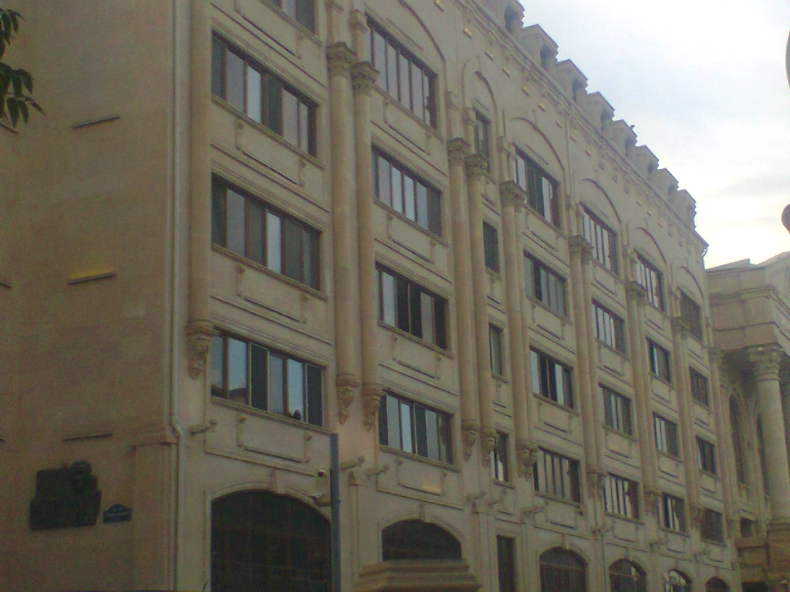 Дом где жил Cümşüd Zülfüqarlı